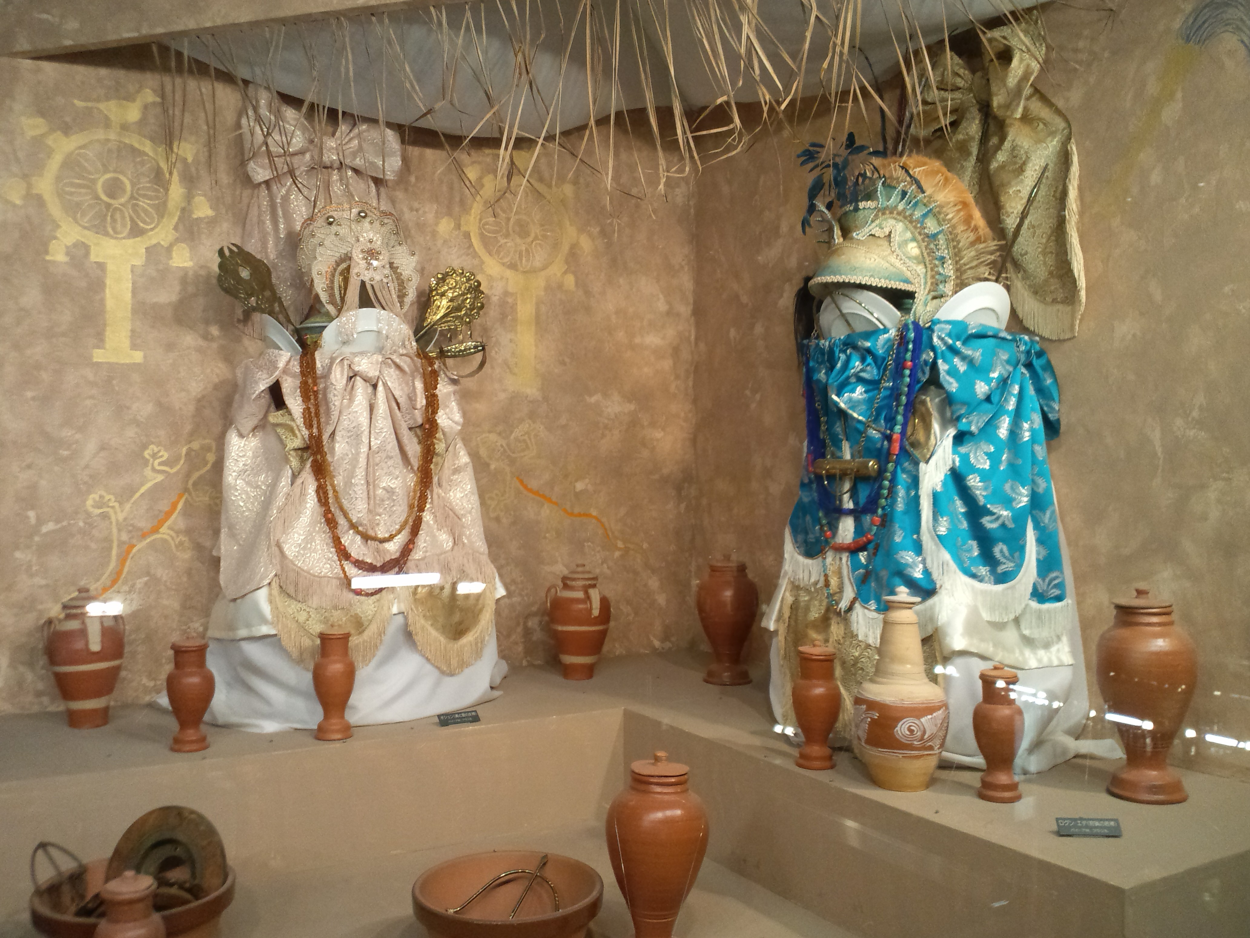 リトルワールド 本館展示室 ブラジルのカンドンブレ